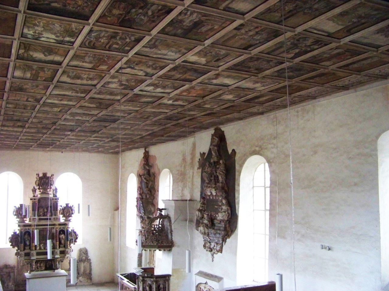 Das Innere der Evangelischen Kirche in Löbnitz